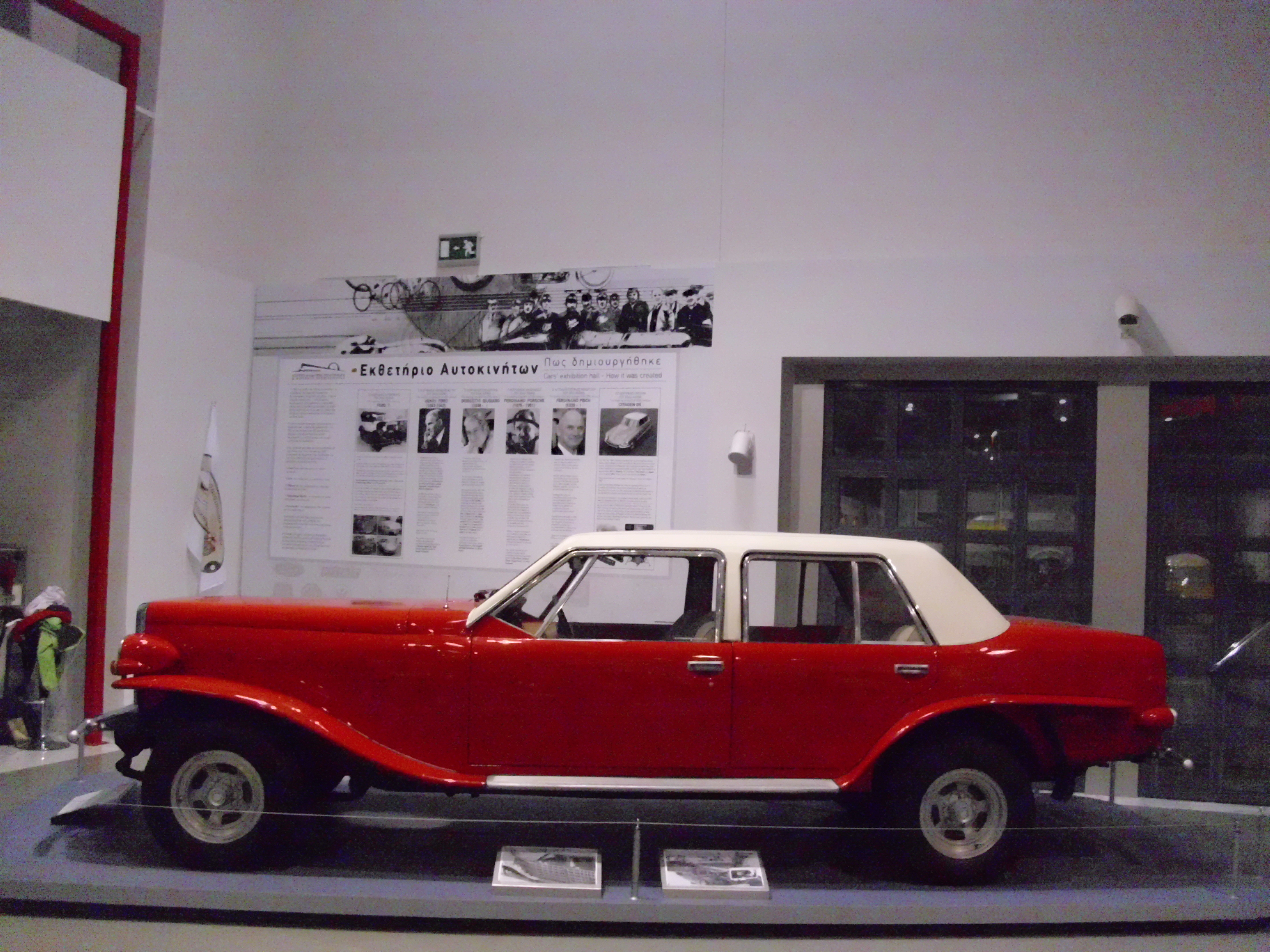 Neorion Chicago von 1974 im Noesis-Technikmuseum in Thessaloniki.